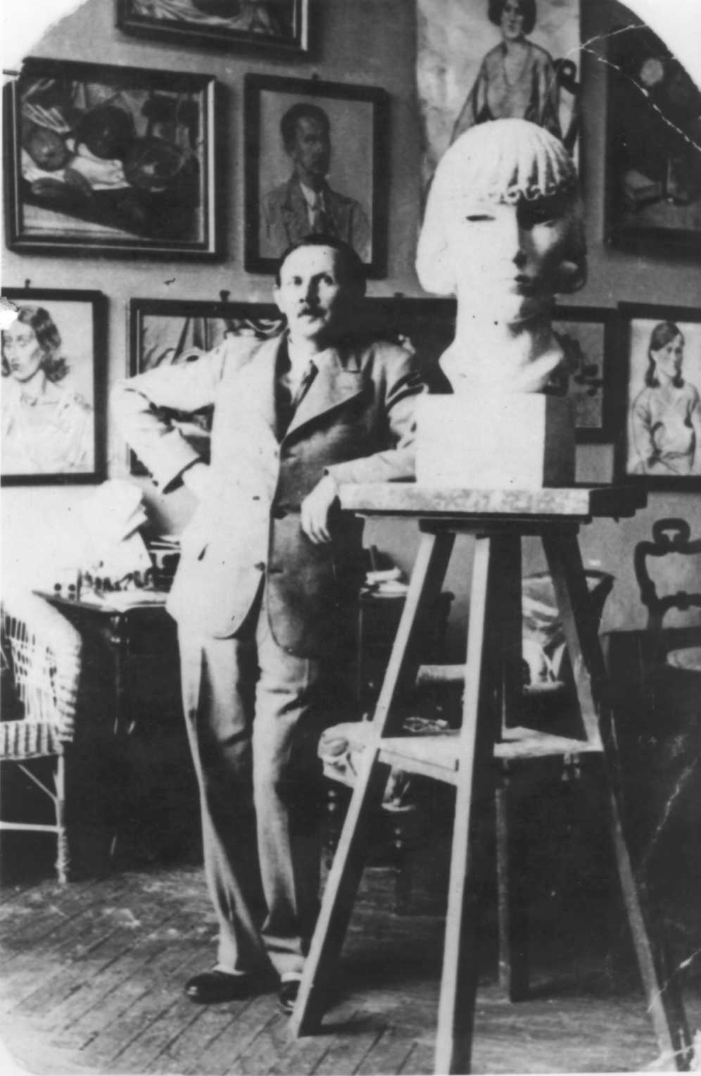 Józef Piotr Mirosław Paszkowski w swojej pracowni w 1936 r.